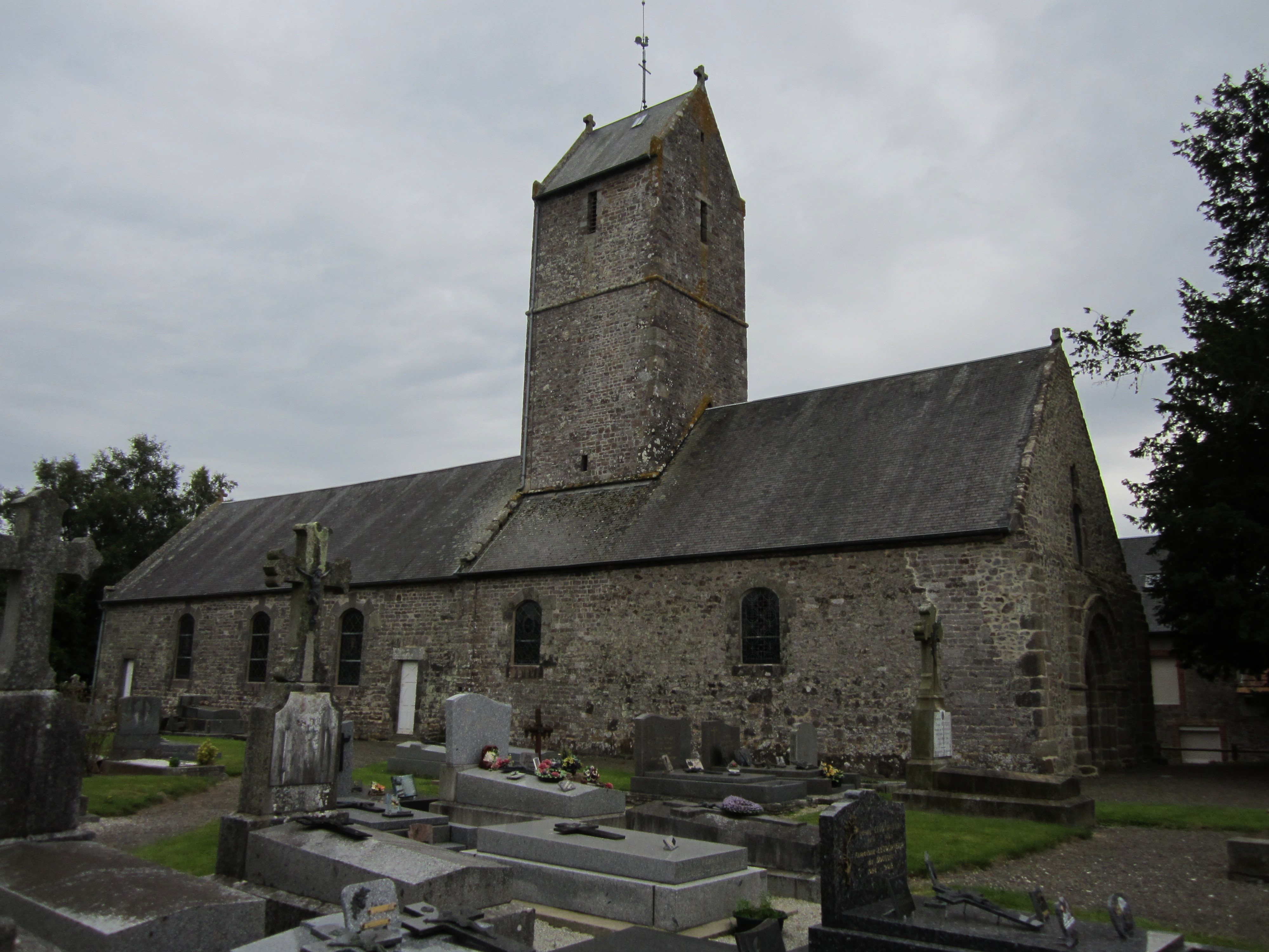 Saint-Ursin, Saint-Jean-des-Champs, Manche